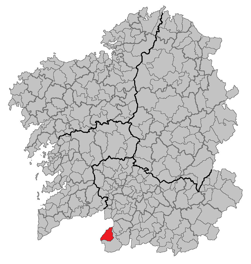 Mapa coa localización do concello de Entrimo.